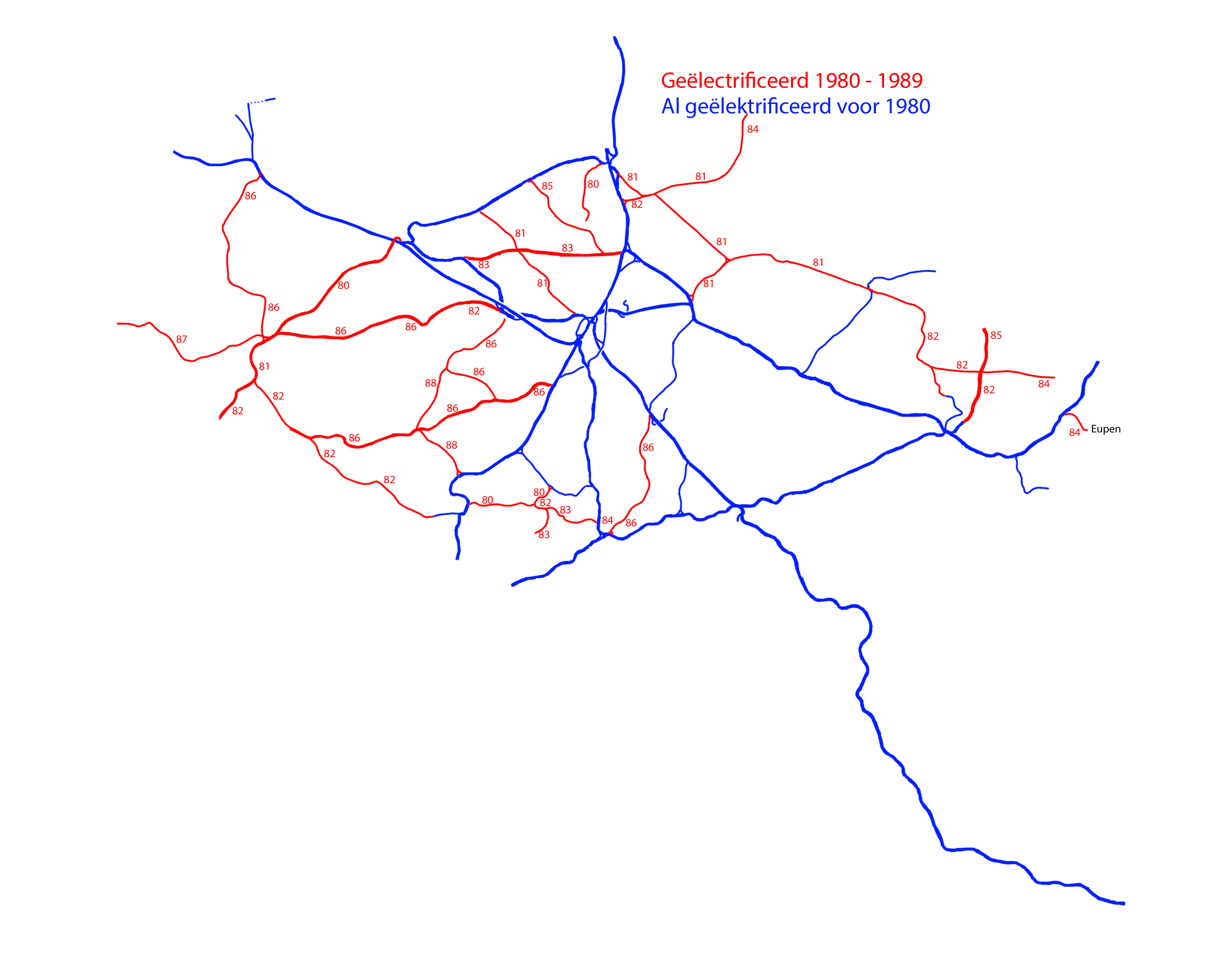 Spoorkaart waarbij alle geëlektrificeerde spoorlijn van voor 1980 zijn ingetekend in het blauw en van de periode 1980 - 1989 in het rood.